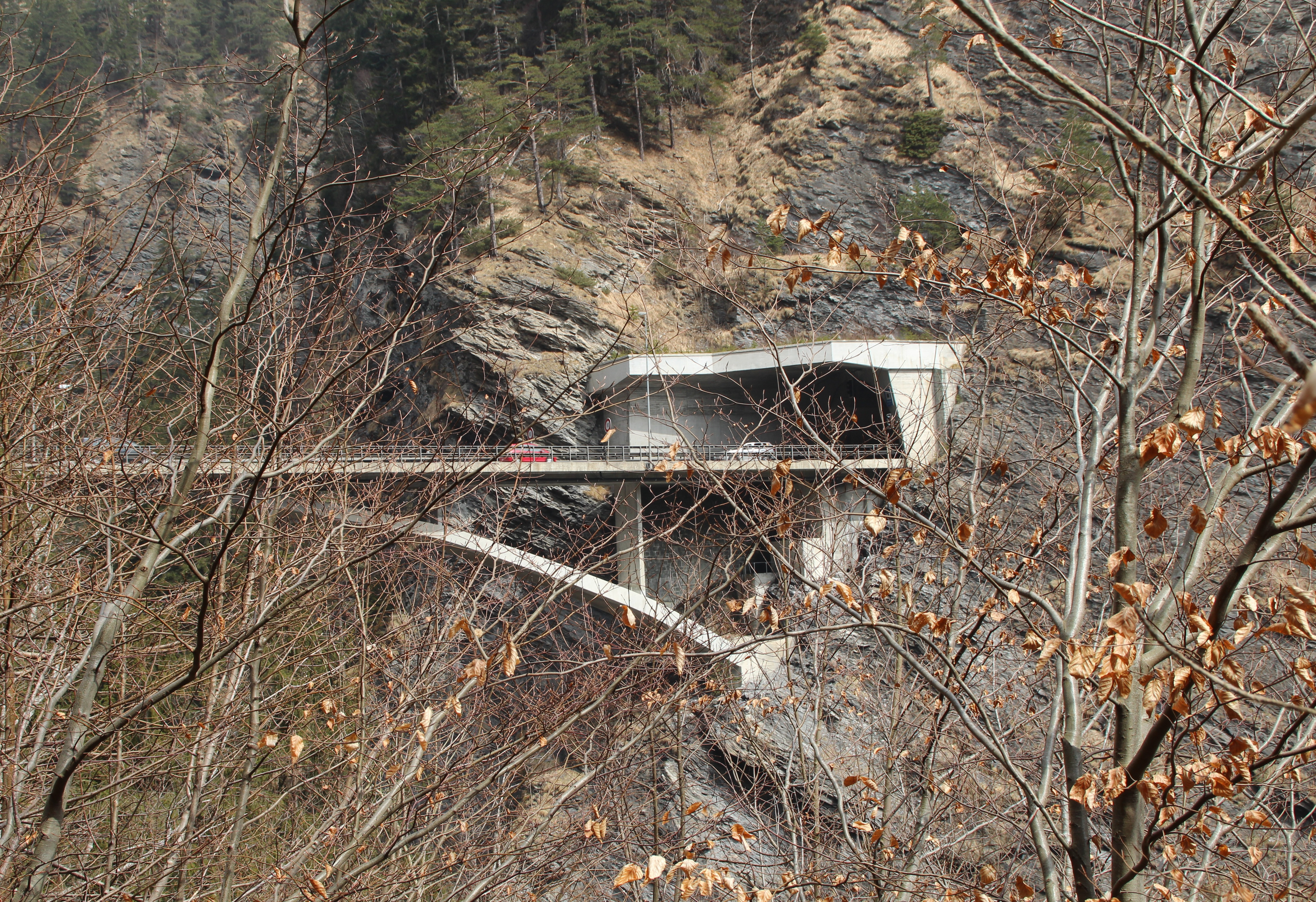 Via Mala-Brücke von Christian Menn, Südportal